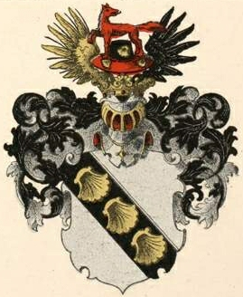 Vietinghoff gen. Scheeli suguvõsa aadli- ja parunivapp